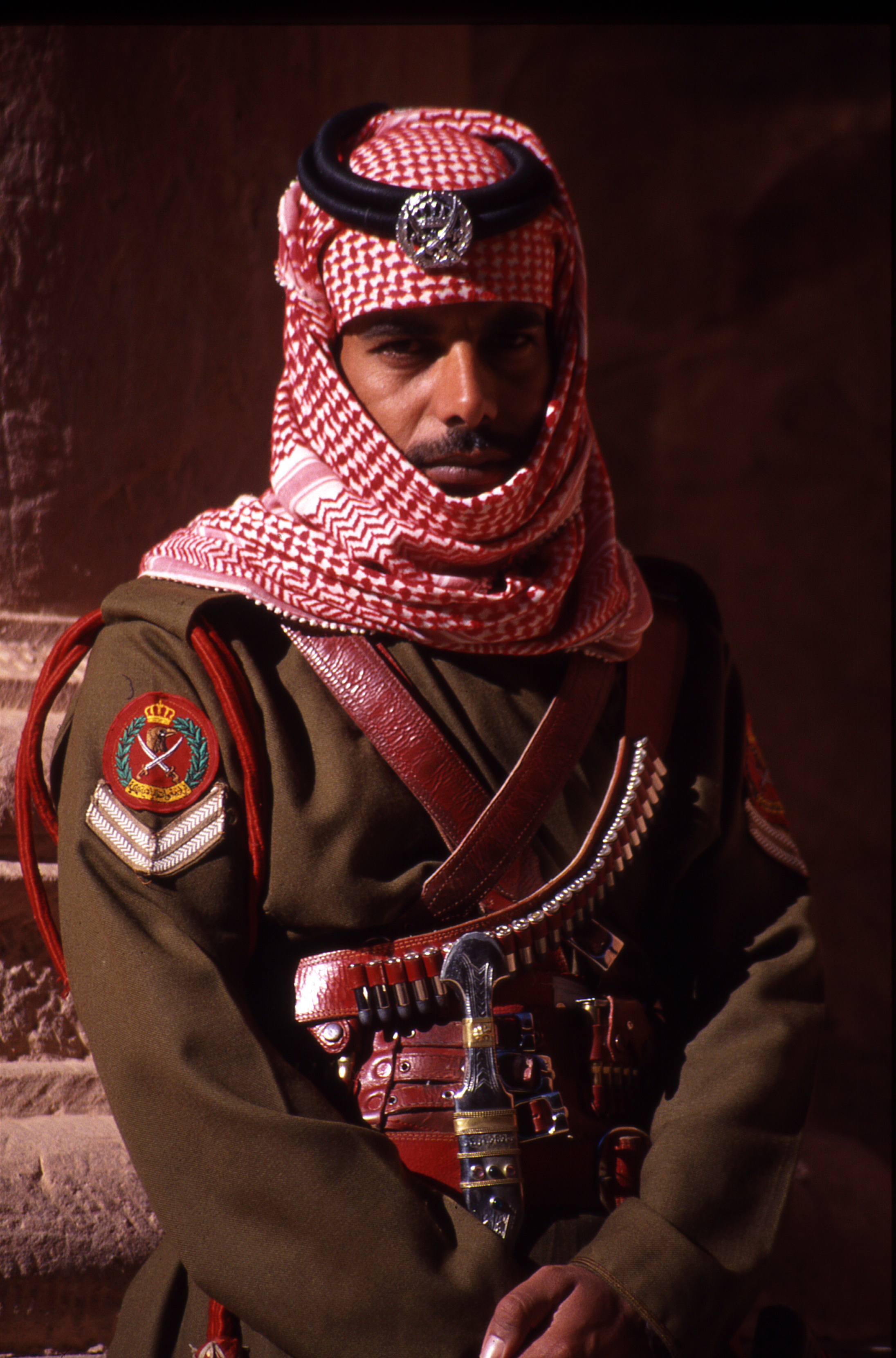 jordanie, petra, policier